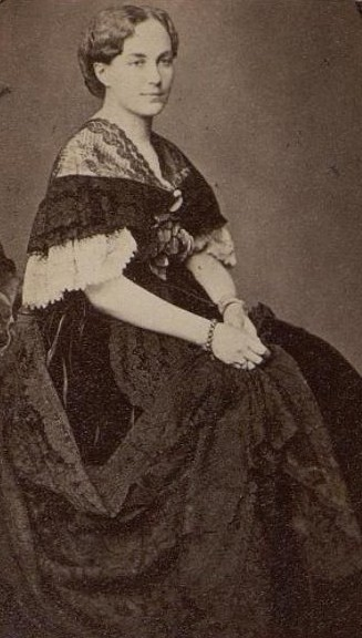 Екатерина Федоровна Чихачева, ур. баронесса Оффенберг (1830—1888)